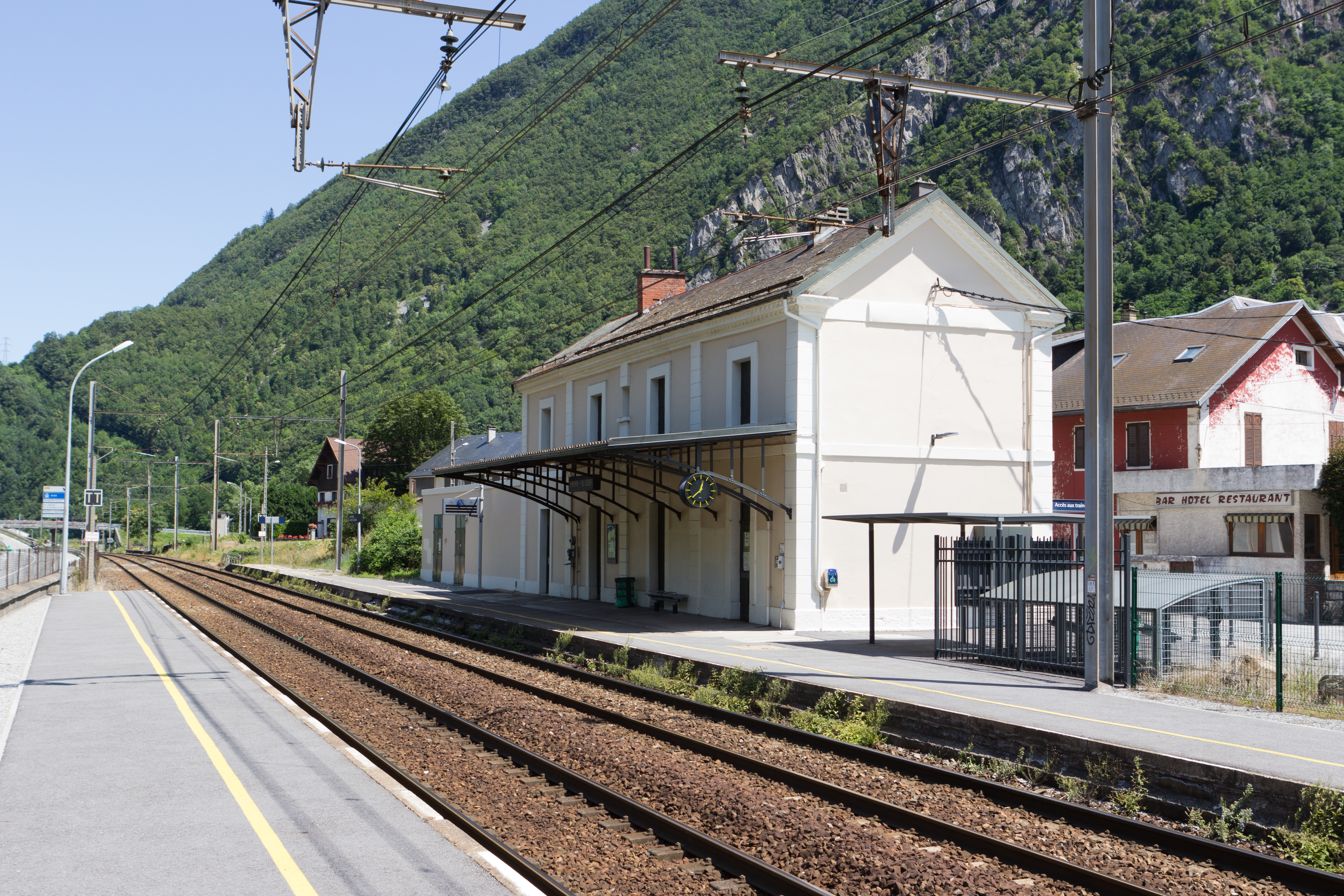 Gare d'Épierre-Saint-Léger, commune d'Épierre, département de la Savoie, France